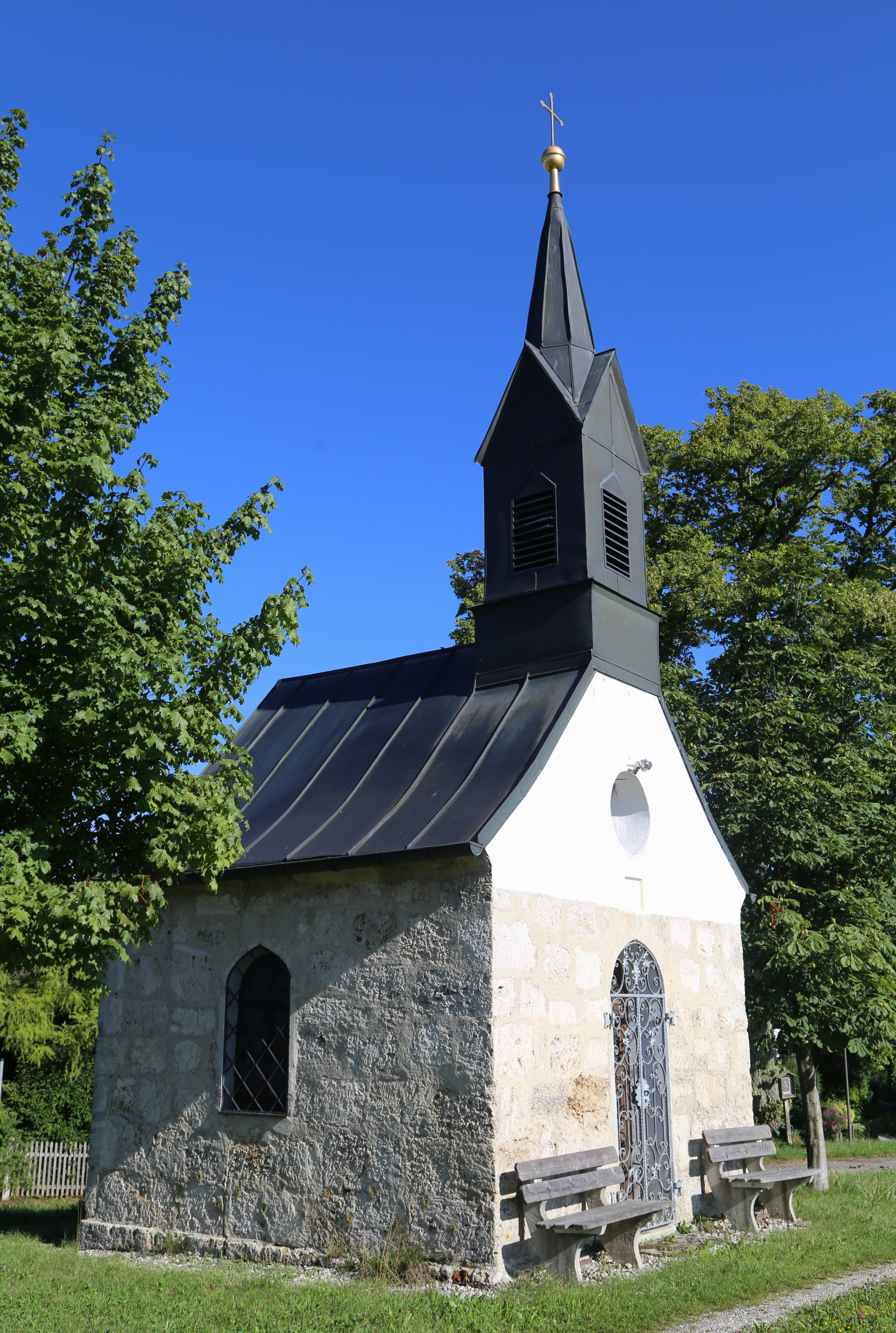 Antersberg 8, Tuntenhausen; Kapelle, unverputzter Tuffquaderbau mit Dachreiter, bez. 1884; mit Ausstattung.